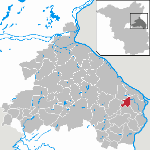 Golzow in Brandenburg (Country) - District Märkisch-Oderland